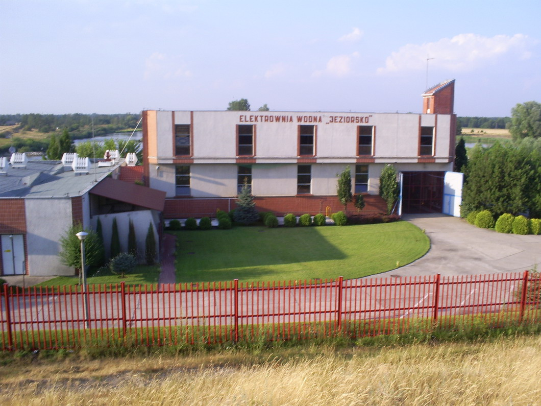 Хидроелектрана Језиорско, на реци Варти, испод језера Језиорско - поглед са бране. (Пољска) 25.07.2006. Author:Jovan Vuković If you need this picture with biger rezolution ask me there.